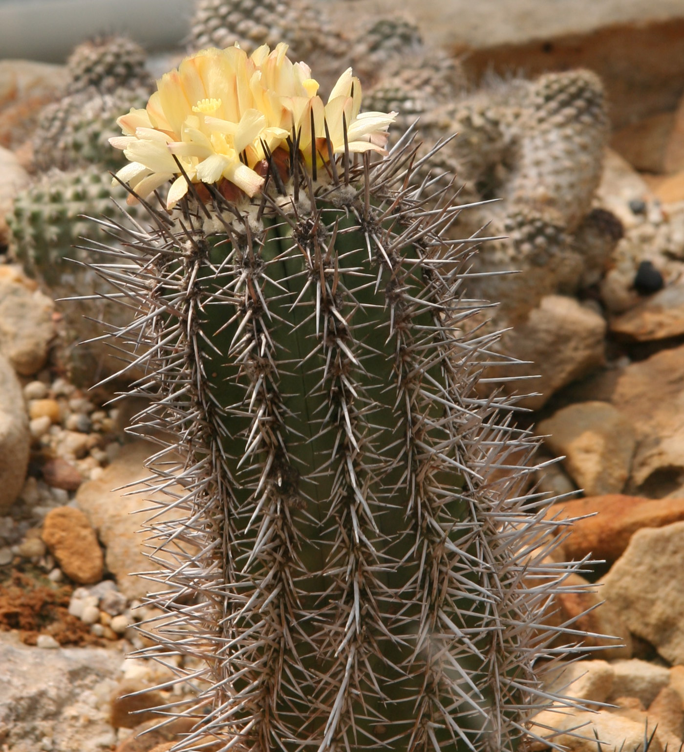 Copiapoa marginata im Botanischen Garten Dresden